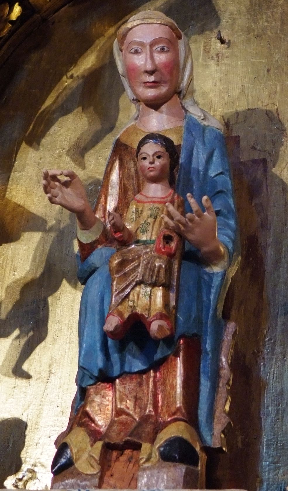 Nuestra Señora de la Capilla (siglo XIII). Iglesia parroquial de Villafranca de la Sierra (Ávila, España). .